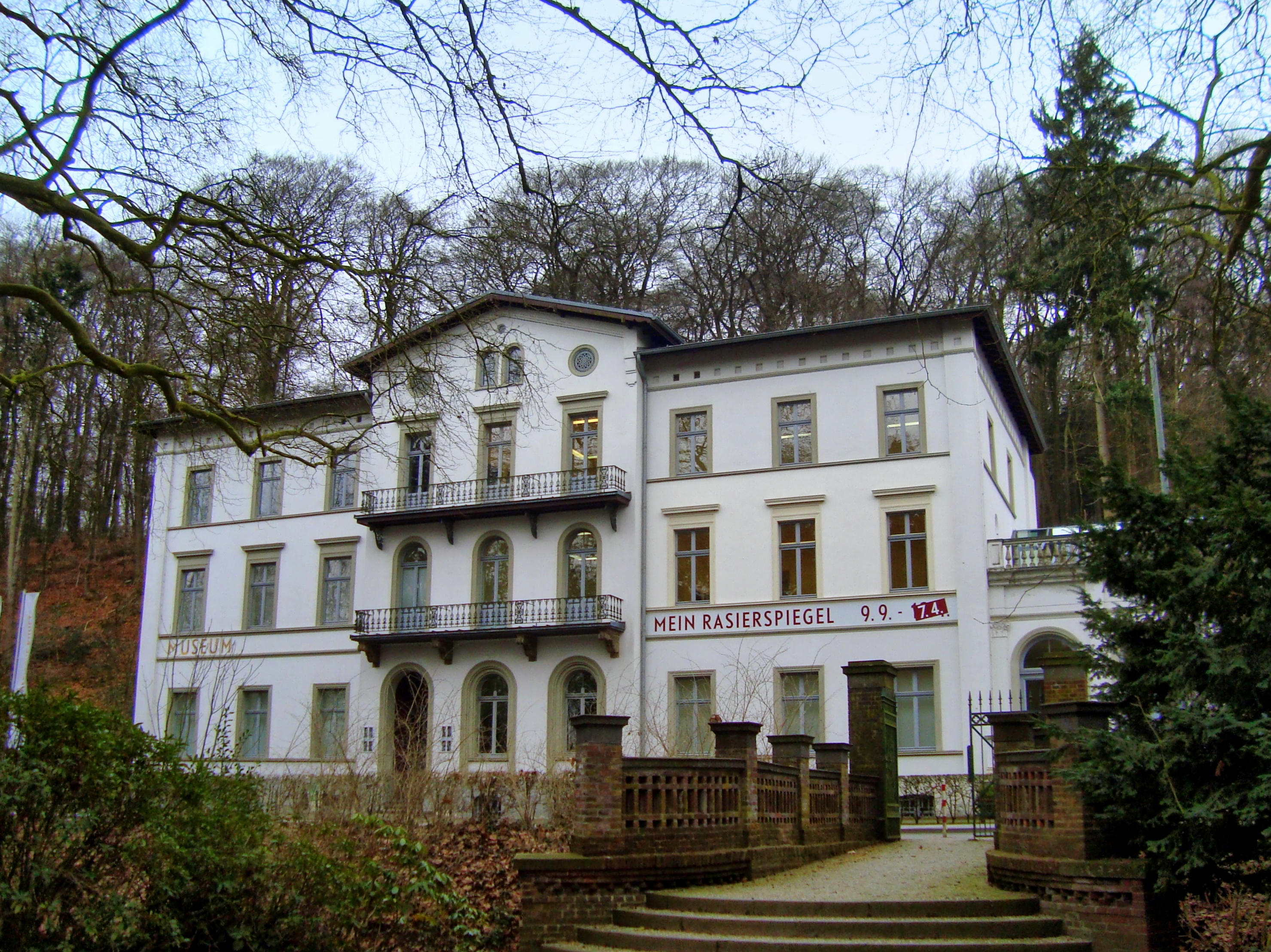 Museum Kurhaus Kleve, (ehemaliges Badehotel, 1872) mit Transparent der Ausstellung: Joseph Beuys Mein Rasierspiegel